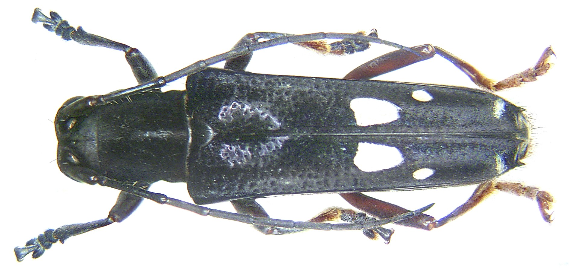 Familie: Cerambycidae Grösse: 17,5 mm Fundort: Malaysia, Borneo, Sabah leg. F. bin Eying, 2005; det. A.Weigel Foto: U.Schmidt, 2006